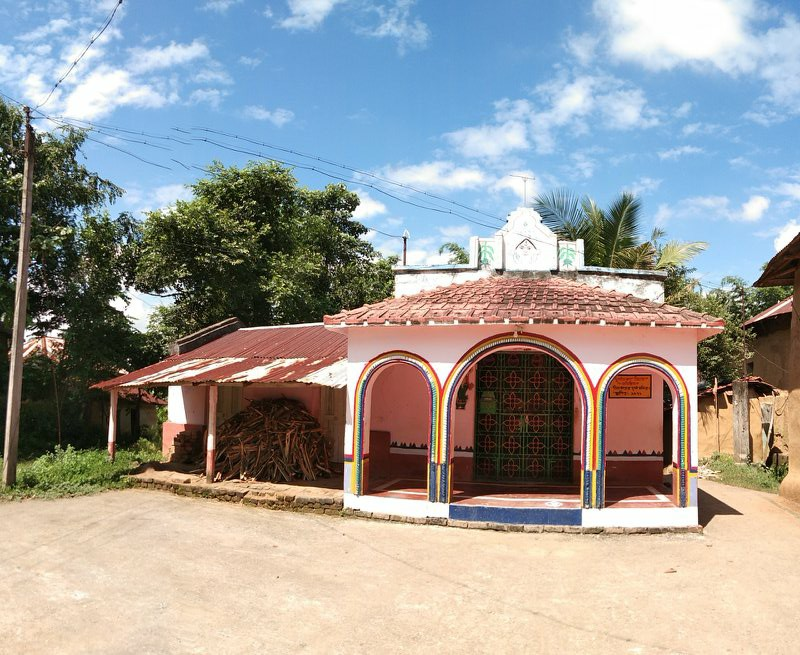 ধানাড়া